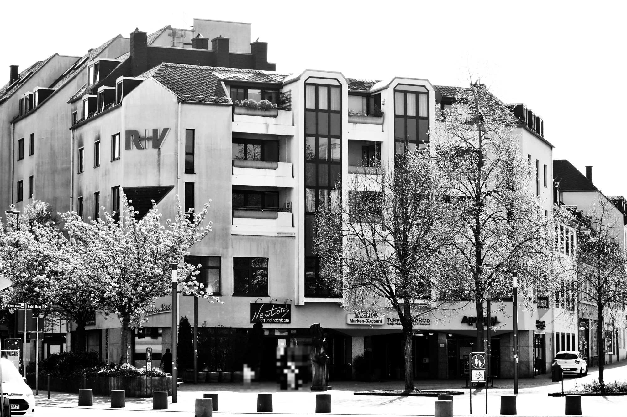 Trier, Pferdemarkt / Walramsneustraße. Blick auf die hintere Fassade der Treviris-Passage zwischen Moselstraße (links) und Jakobstraße (rechts).